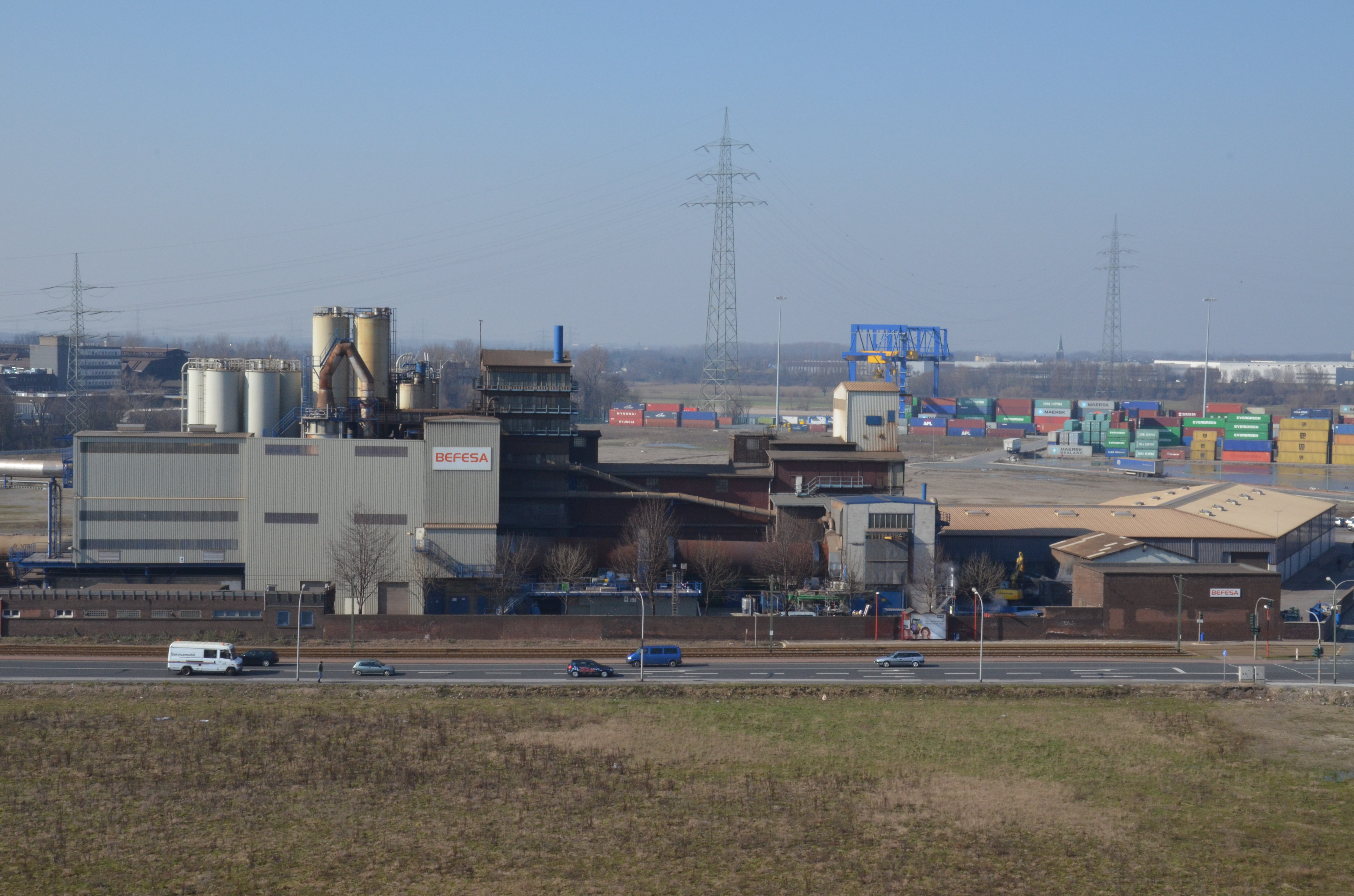 Ausblick von der Heinrich-Hildebrand-Höhe im Angerpark in Duisburg-Angerhausen; die beiden Masten in der Bildmitte und rechts im Hintergrund bilden die Rhein-Freileitungskreuzung Duisburg-Wanheim